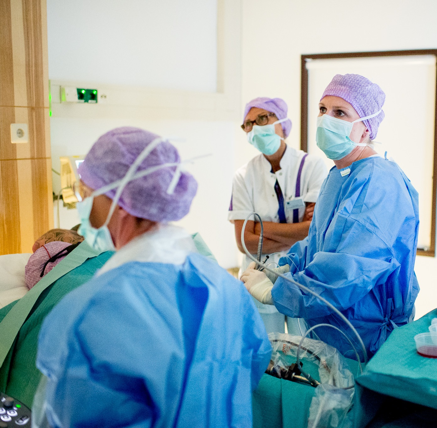 Laser operatie voor tweeling transfusie syndroom, LUMC Leiden